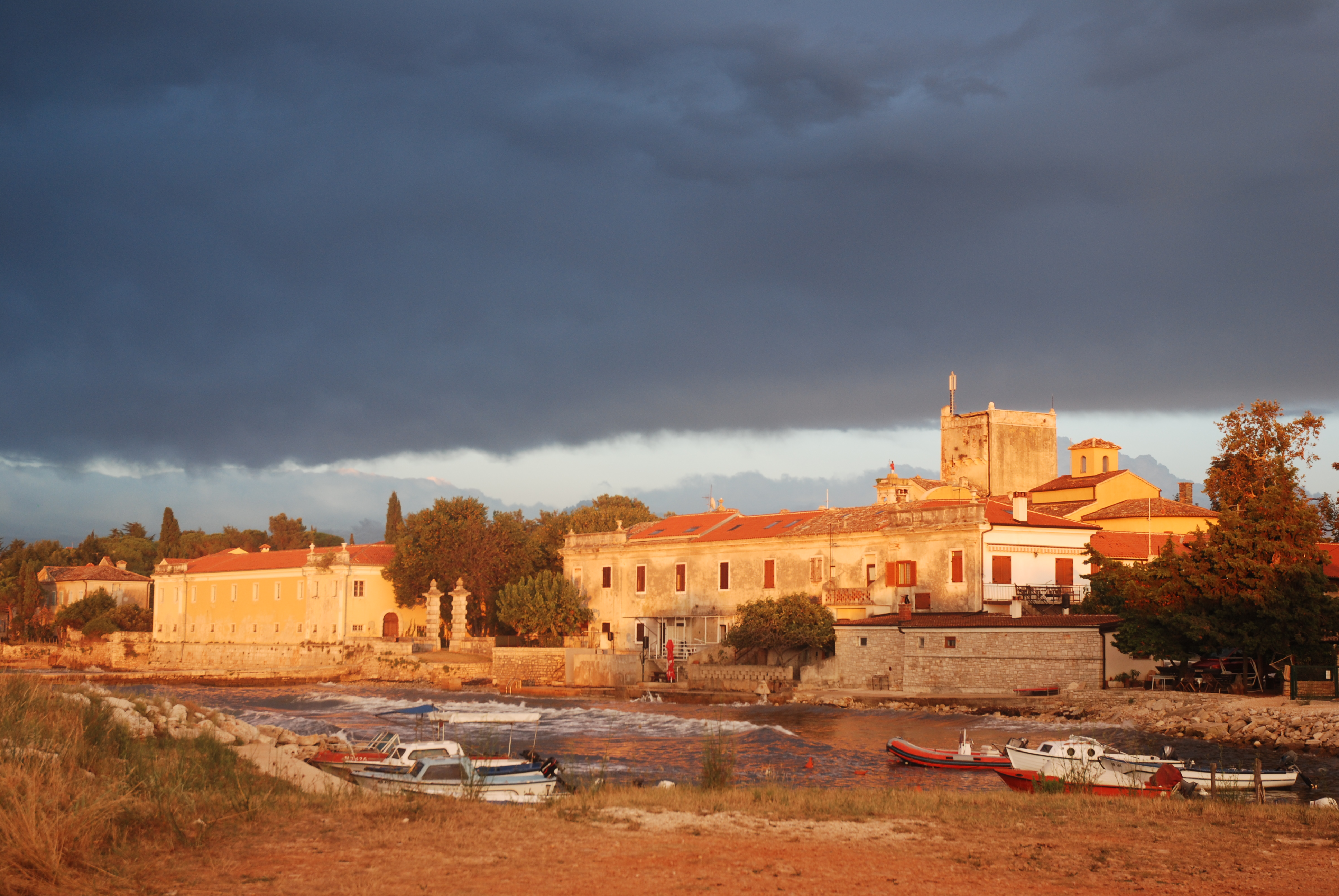 Late benedictine monastery, Dajla